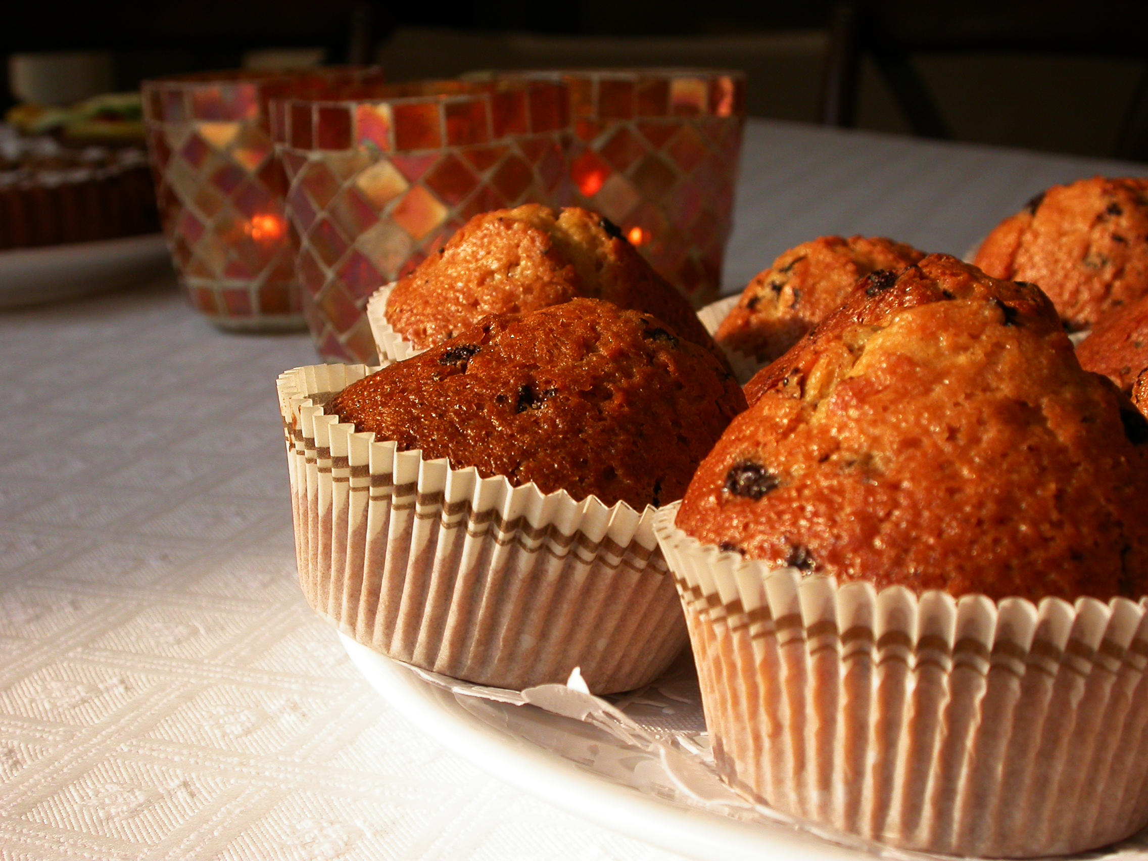 Description Kleine cake'jes (Berlare,Be) Publiek domein, zelfgemaakte media Kleine cake'jes (Berlare,Be)